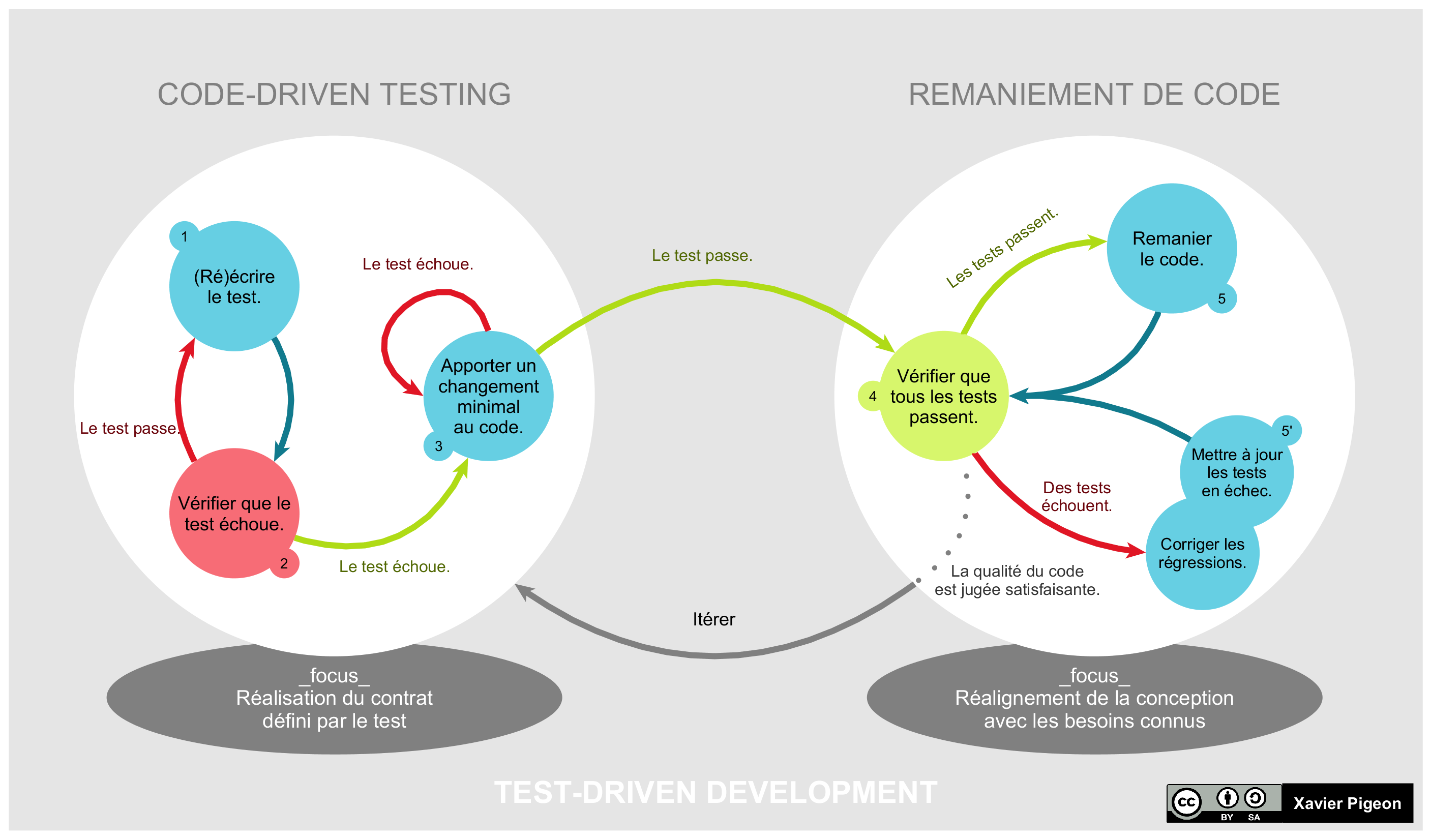 Cycle de la méthode Développements Pilotés par les Tests (TDD)